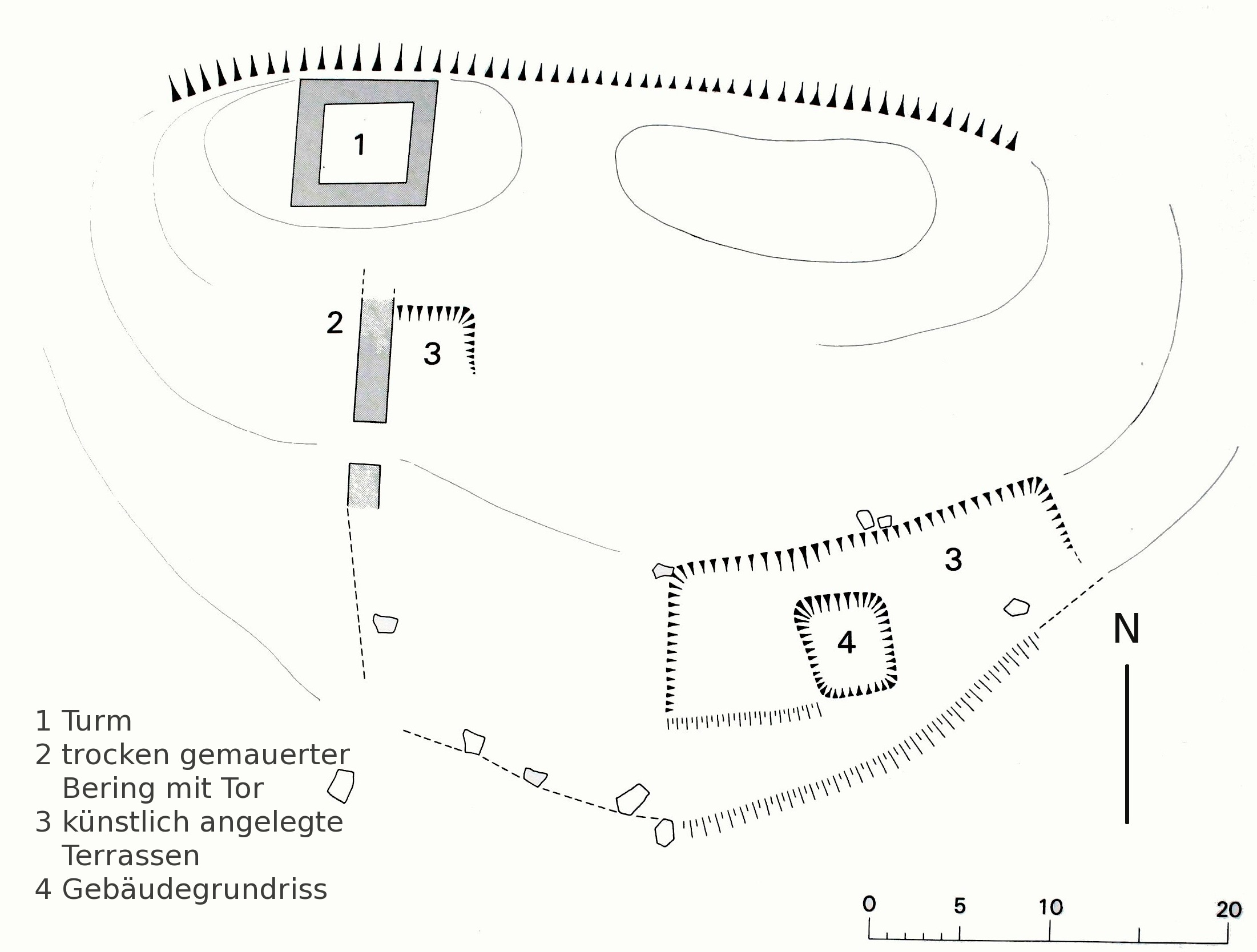 Burg Spliatsch: Übersicht